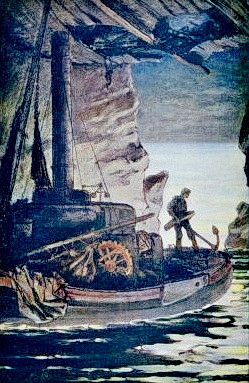 Achille Granchi-Taylor : Illustration pour "Les travailleurs de la mer" de Victor Hugo